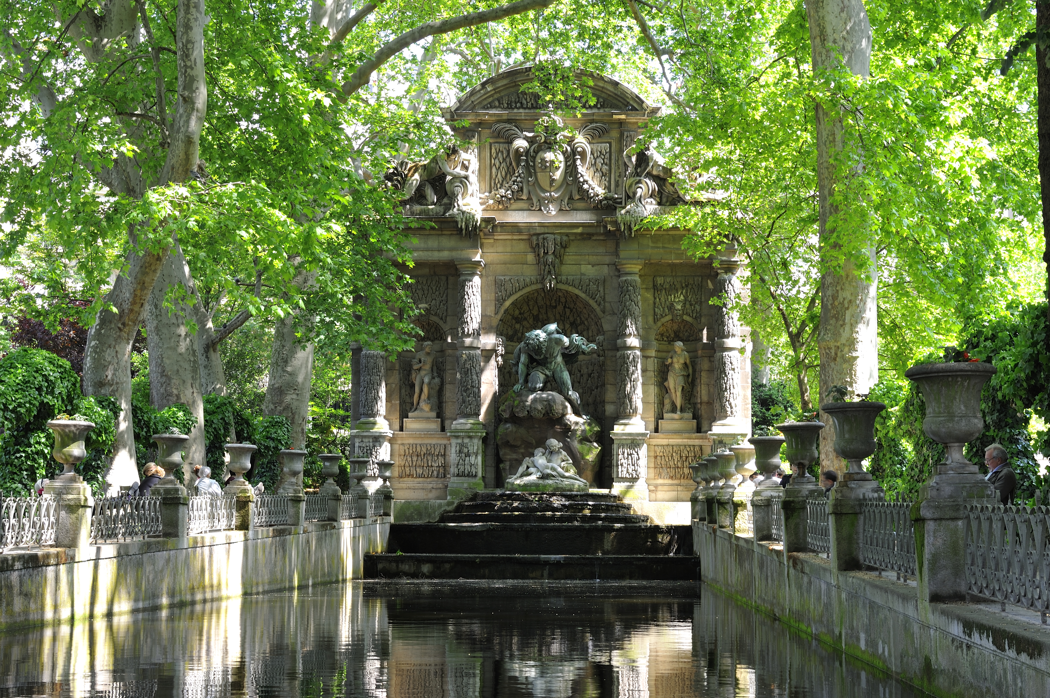 Fontaine Médicis, Paris, France.